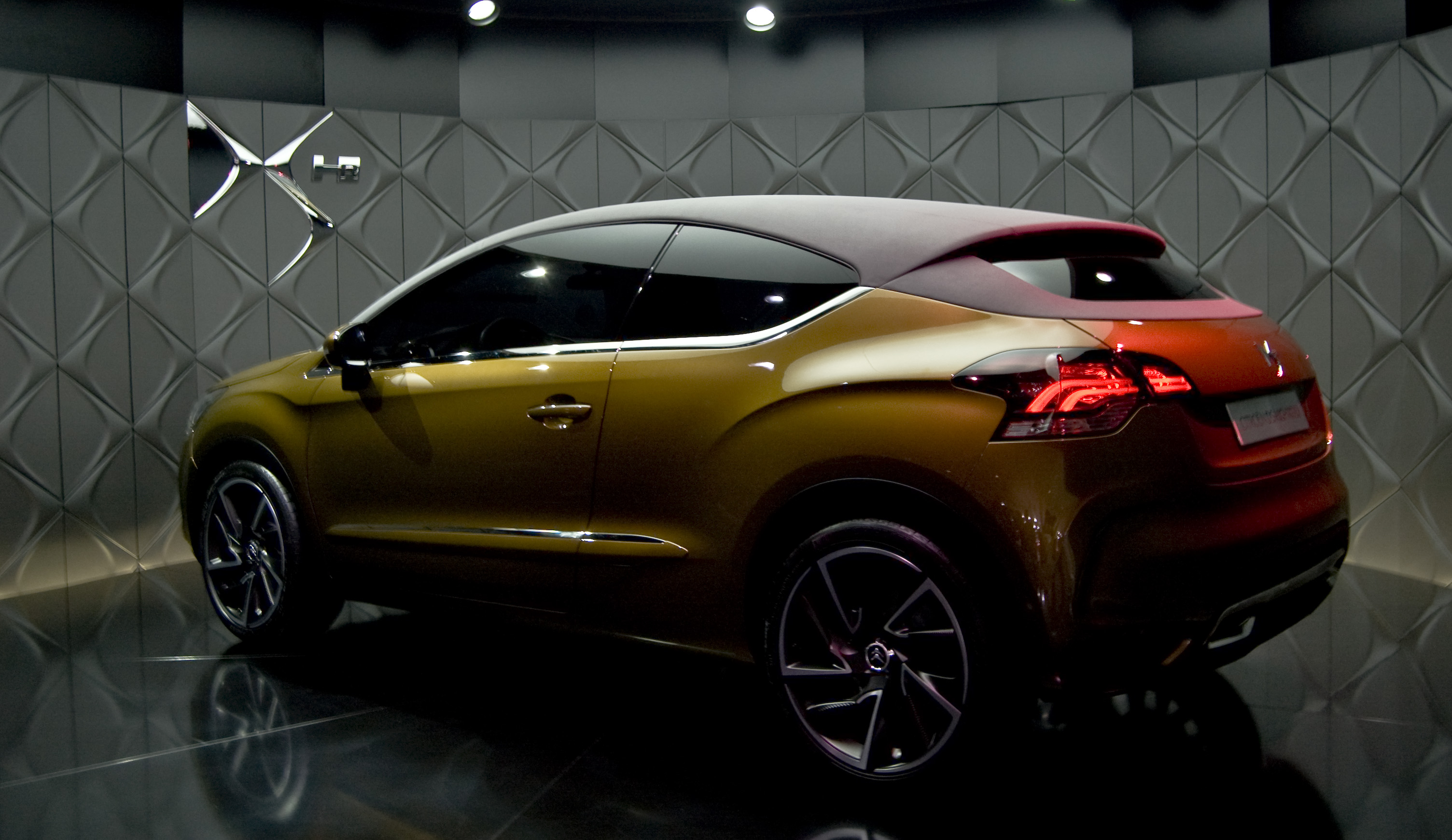 Citroën DS High Rider en el Salón de Ginebra 2010. Un adelanto del futuro Citroën DS4.